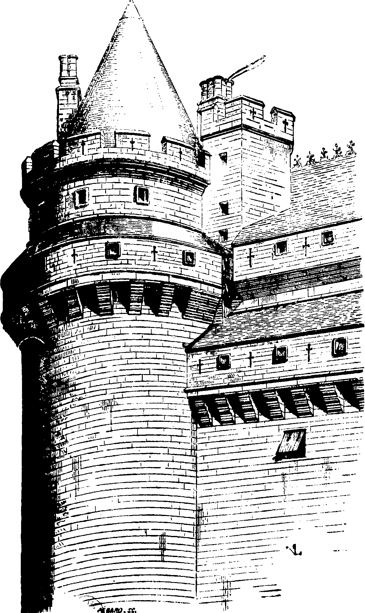 Dessin extrait de l'ouvrage Description du château de Pierrefonds, Paris : Bance, 1857, par Eugène Viollet-le-Duc.